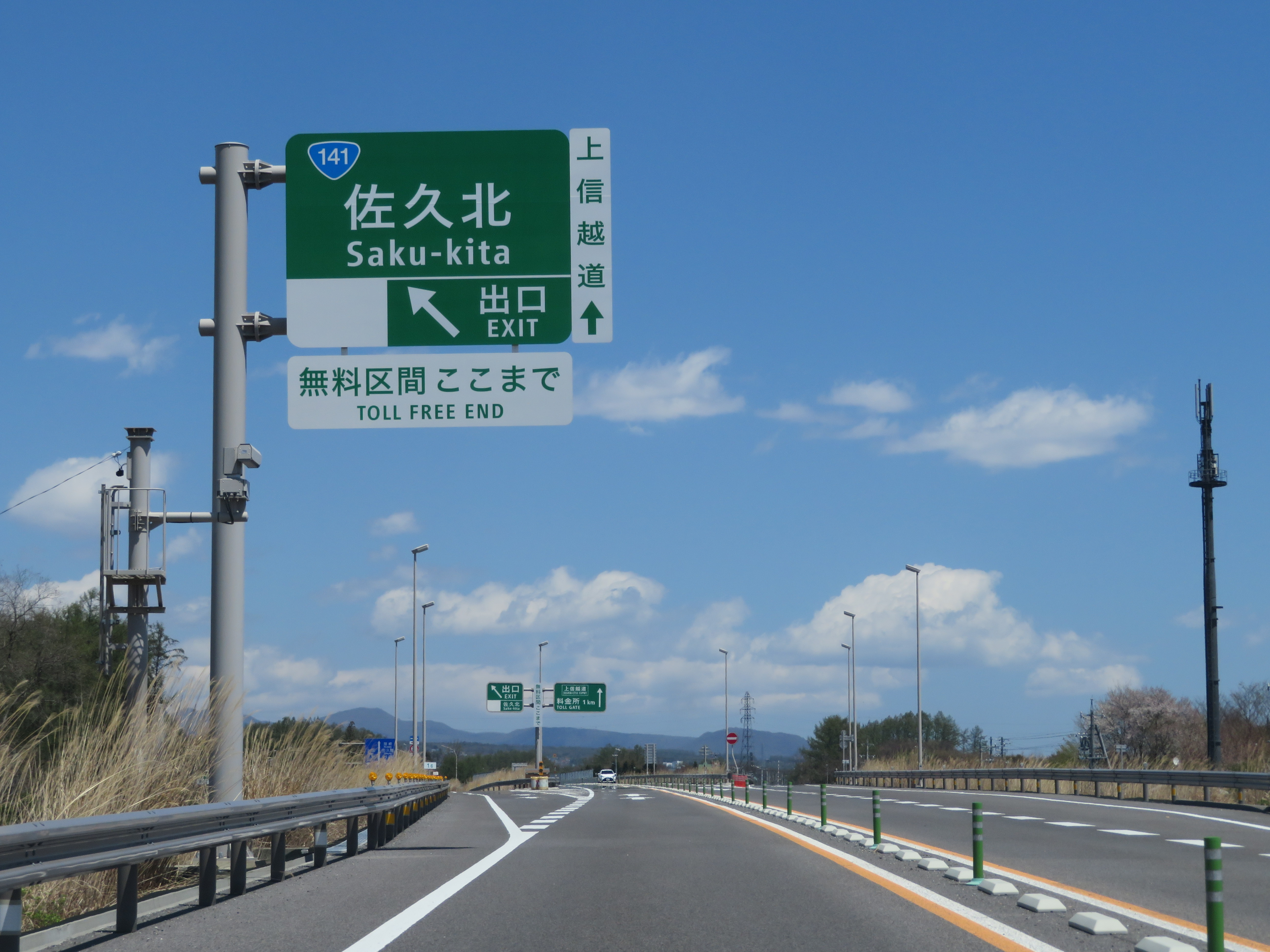 中部横断自動車道佐久北インターチェンジ出入口付近（佐久小諸ＪＣＴ方面を撮影） Canon PowerShot SX720 HS